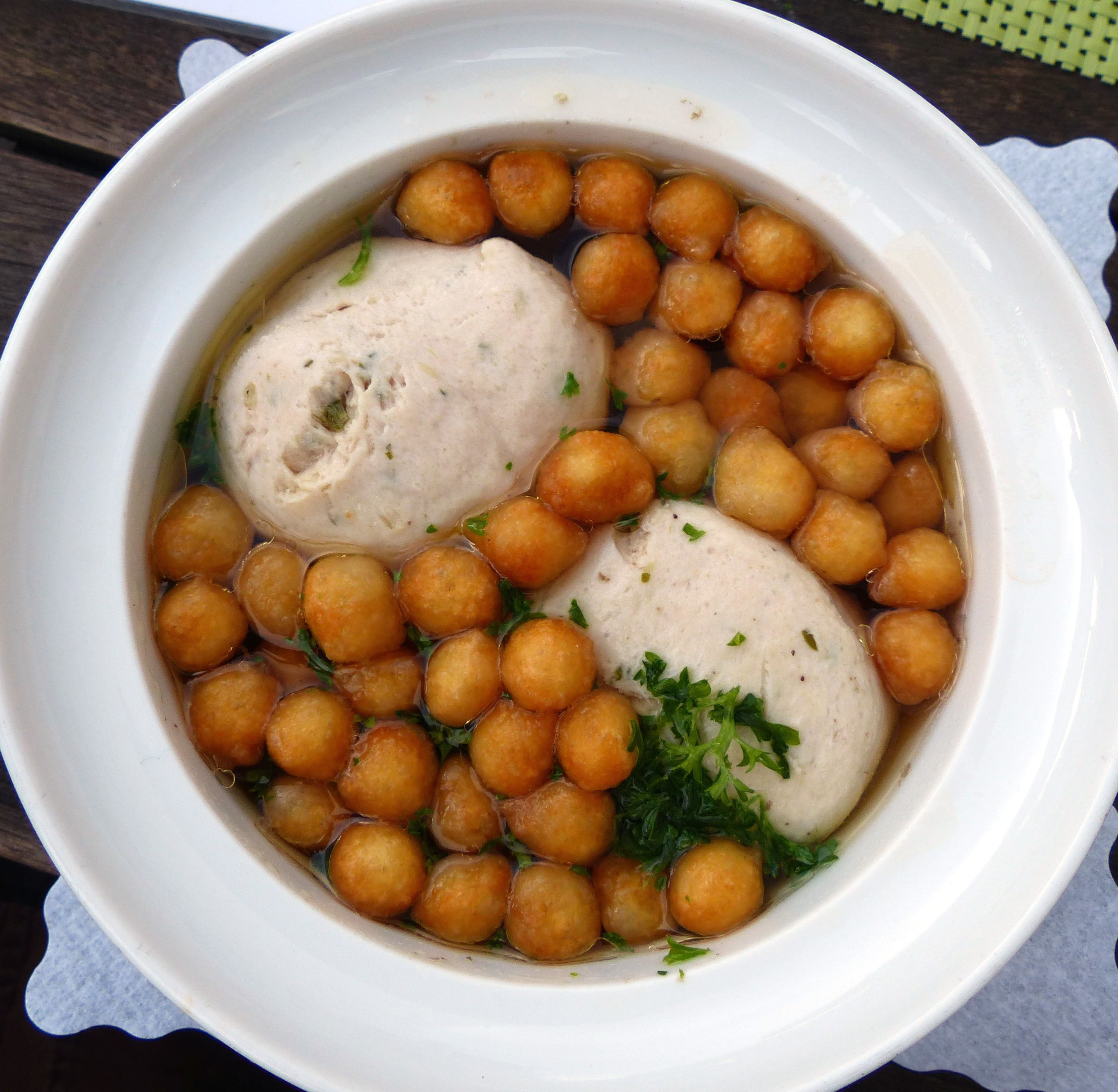 Schwäbische Brätknödelsuppe